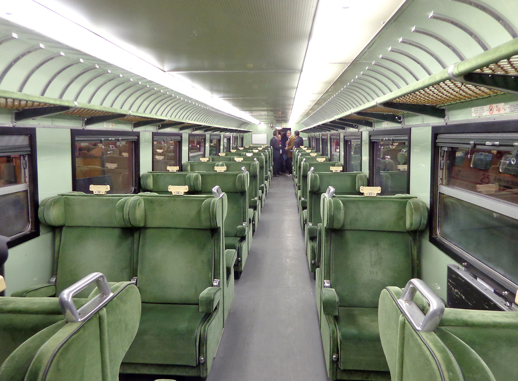 Interno dell'elettrotreno ETR.232 delle Ferrovie dello Stato, appartenente al parco dei rotabili storici.